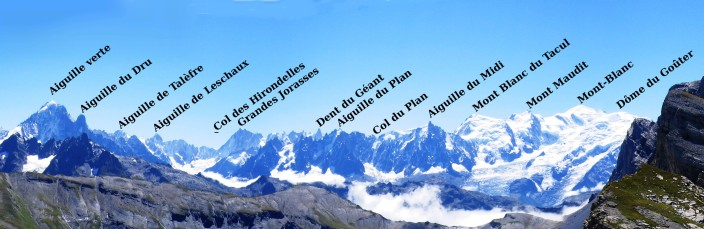 Panorama légendé des principaux sommets d'une partie du Massif du Mont-Blanc pris depuis la chaîne des Fiz.